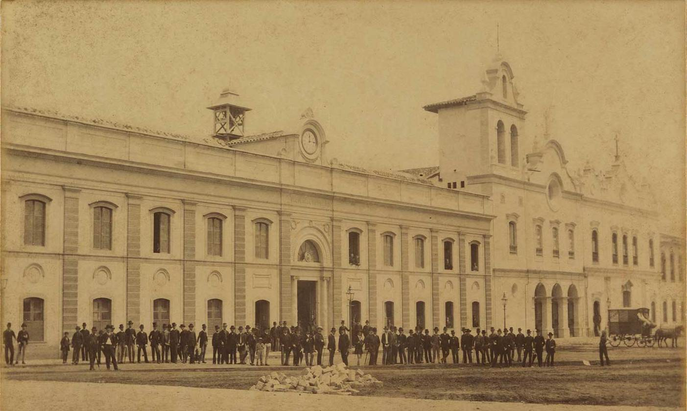 Renouleau, Jean Georges, 1845-1909 – Título: Faculdade de Direito de São Paulo – São Paulo, SP : Casa Jules Martim, [1880?]